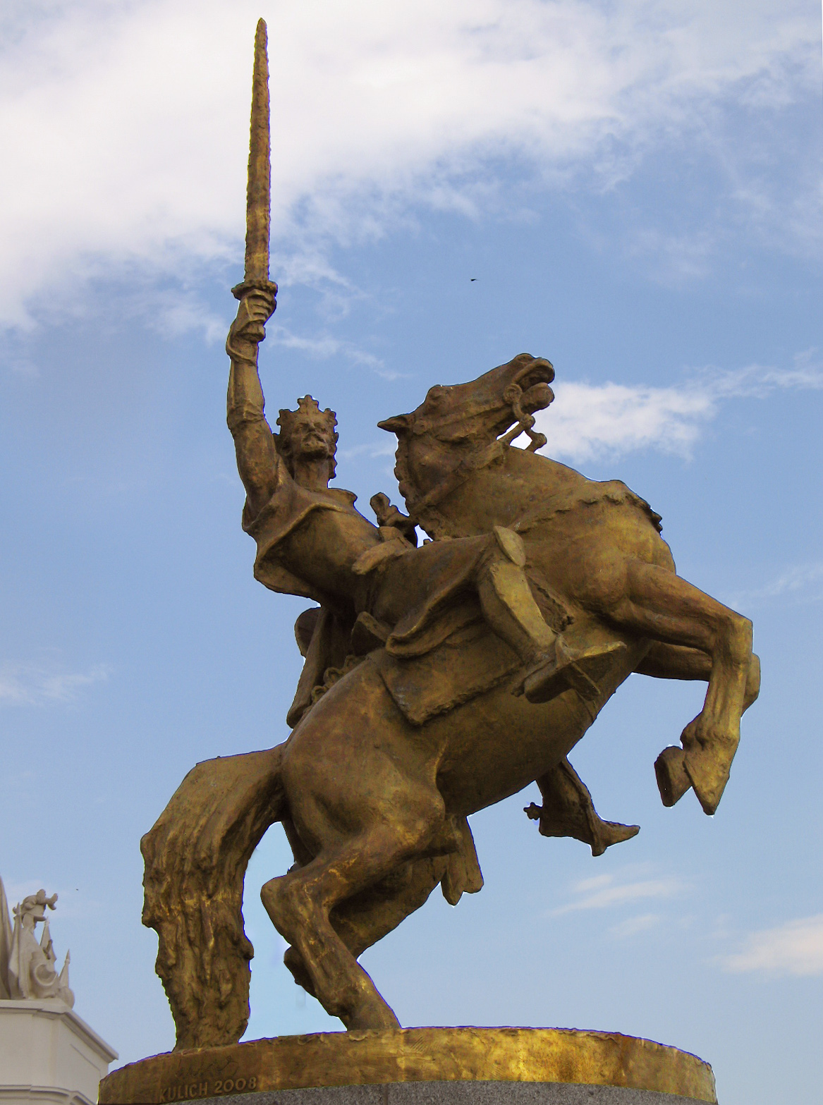 Kráľ Svätopluk pochádzal z dynastie Mojmírovcov, od 50. rokov 9. storočia bol knieža Nitrianskeho kniežatstva, v rokoch 871-894 tretím a najvýznamnejších panovníkom Veľkej Moravy.